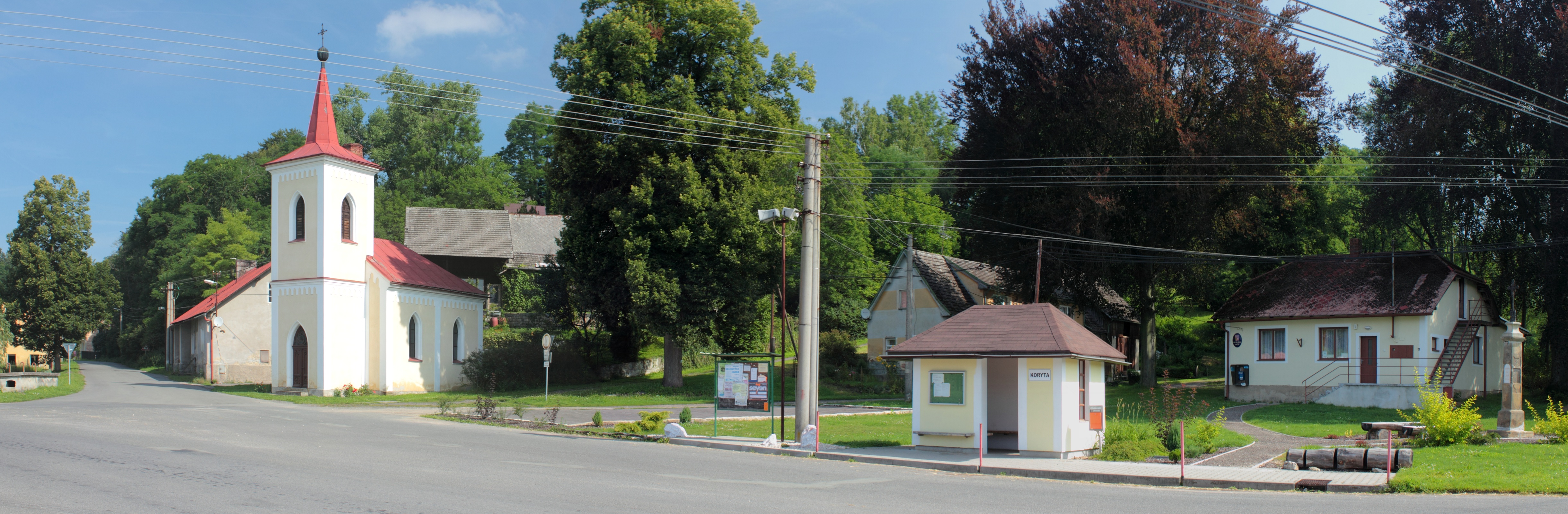 Česky: Náves v Korytech s kaplí autobusovou zastávkou, obecním úřadem a křížem